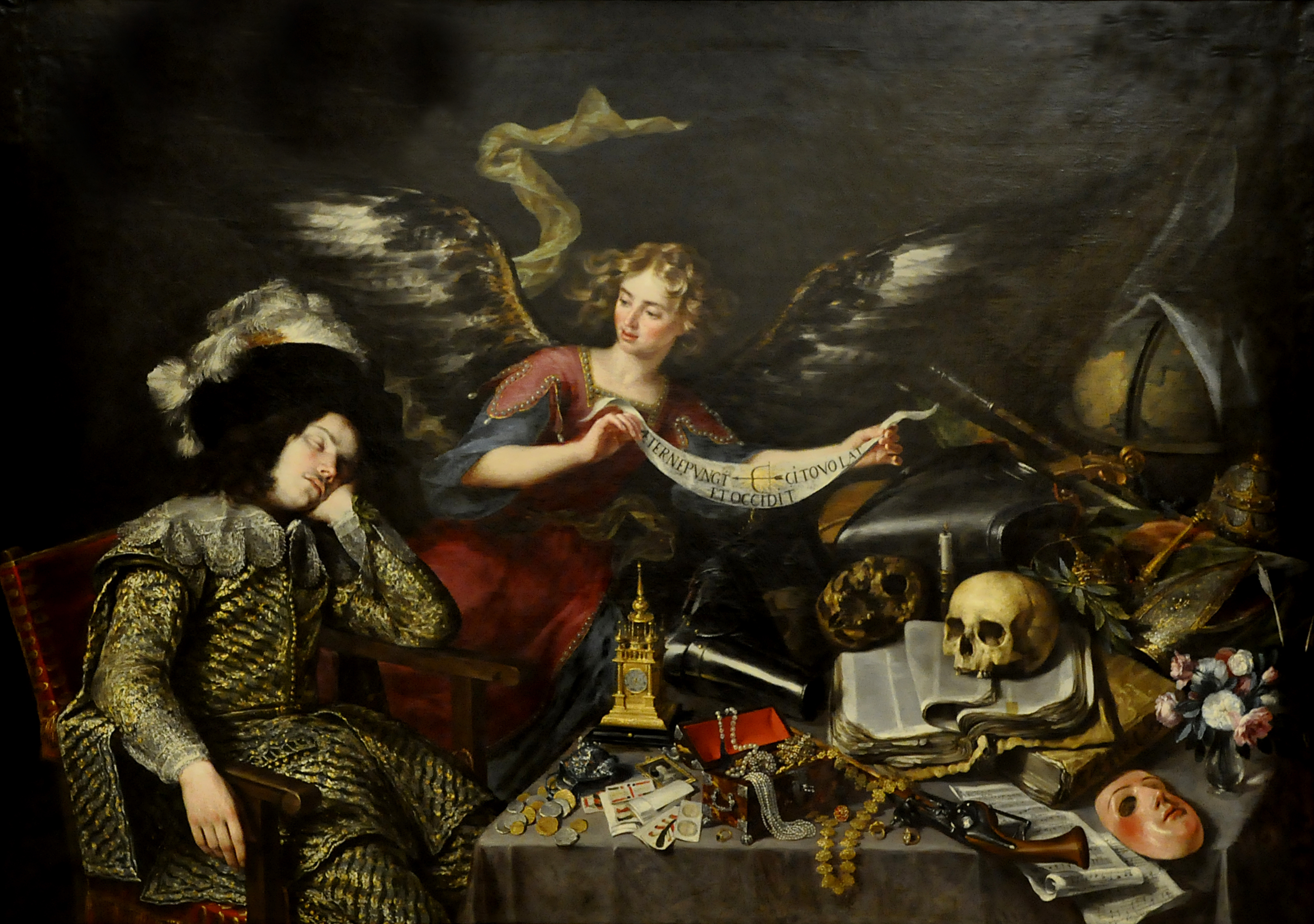 La obra representa a un caballero del siglo XVII vestido con la indumentaria de la época y dormido mientras un ángel le muestra el carácter efímero de los placeres, las riquezas, los honores y la gloria. El ángel le muestra el jeroglífico de la fecha sobre el sol, que hiere, vuela raudo y mata. El conjunto de objetos situados sobre la mesa constituye un auténtico bodegón en el que se establece una condensación de símbolos y alegorías. Los símbolos de la mesa son muy complejos, pero destacan algunos por su presencia continua en todas las "vanitas": la calavera que simboliza la muerte, la máscara de teatro sobre la hipocresía, las joyas y el dinero que son las riquezas que no podemos llevar al otro mundo, la baraja y las armas como el juego y los placeres de la caza, el reloj que indica el paso inexorable del tiempo, la vela apagada que indica la extinción de la vida... son innumerables los objetos y los múltiples significados engarzados que podemos entresacar de todos ellos. El pintor ha representado un "corpus" de los objetos de la vanidad del mundo y de su sin sentido tratados con una definición magistral que los individualiza como forma de acentuar, a través de lo real, la presencia de su carácter didáctico, alegórico y moral.